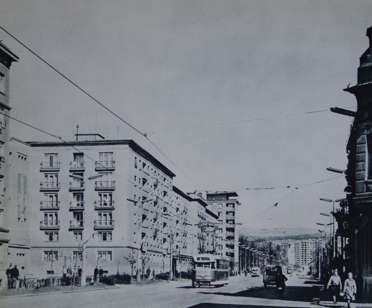 Komeského ulica v Košiciach.